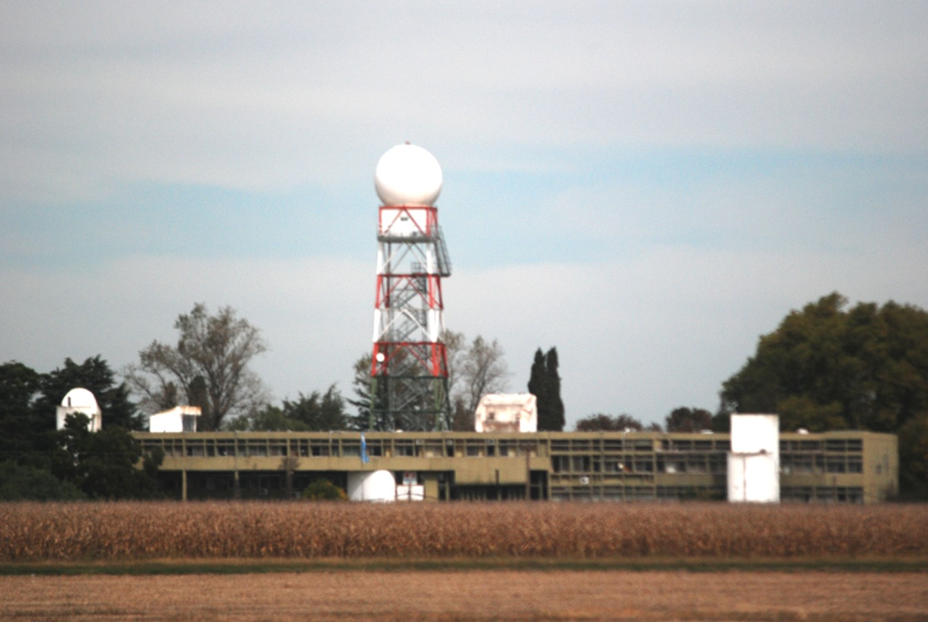 Radar meteorológico doppler Selex ES GmbH Gematronik, en la Estación Experimental del INTA (Instituto Nacional de Tecnología Agropecuaria) de Pergamino, provincia de Buenos Aires, Argentina.